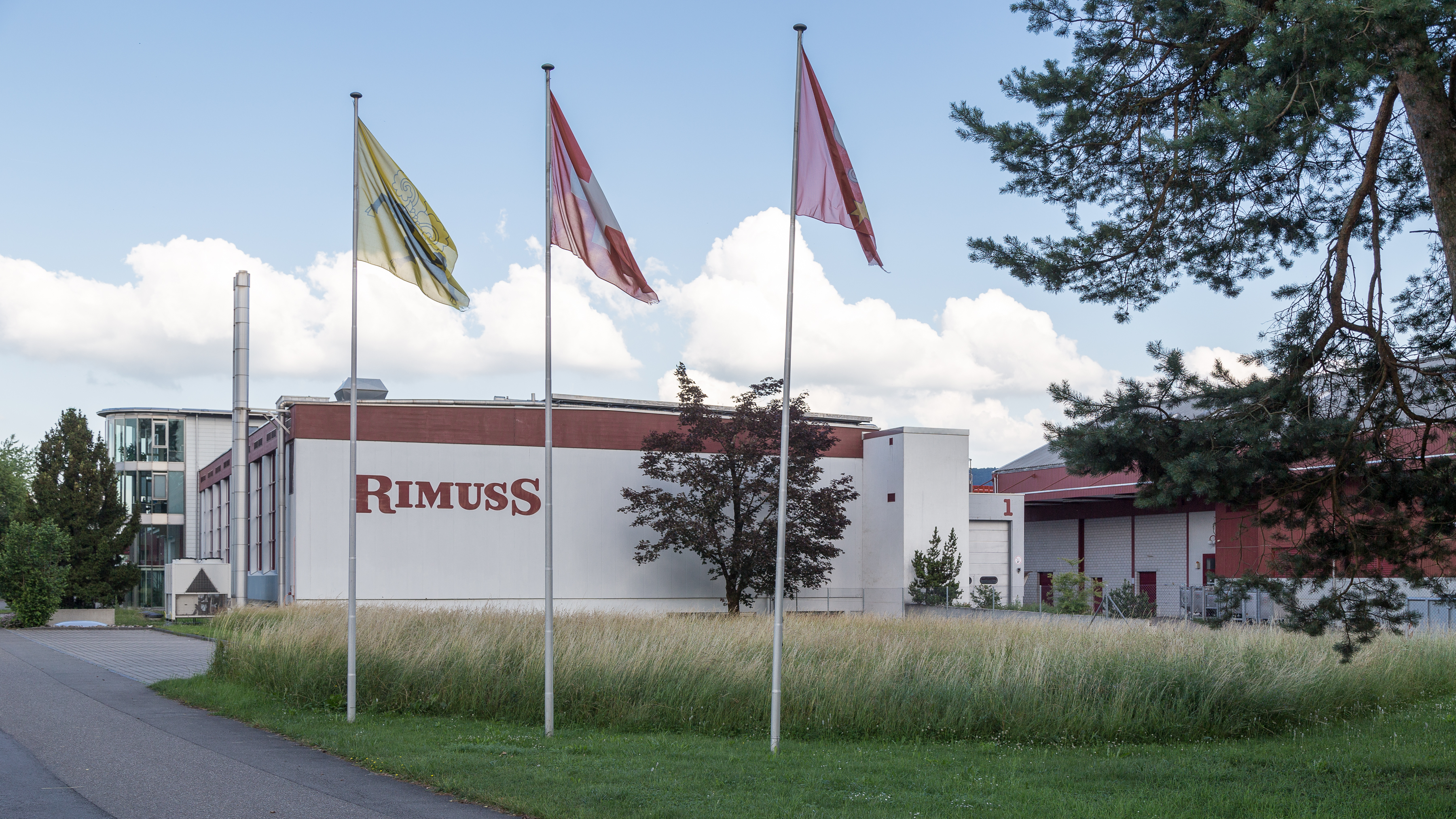 Rimuss Kellerei Rahm Betriebsgebäude im Gewerbegebiet an der Dickistrasse in Hallau